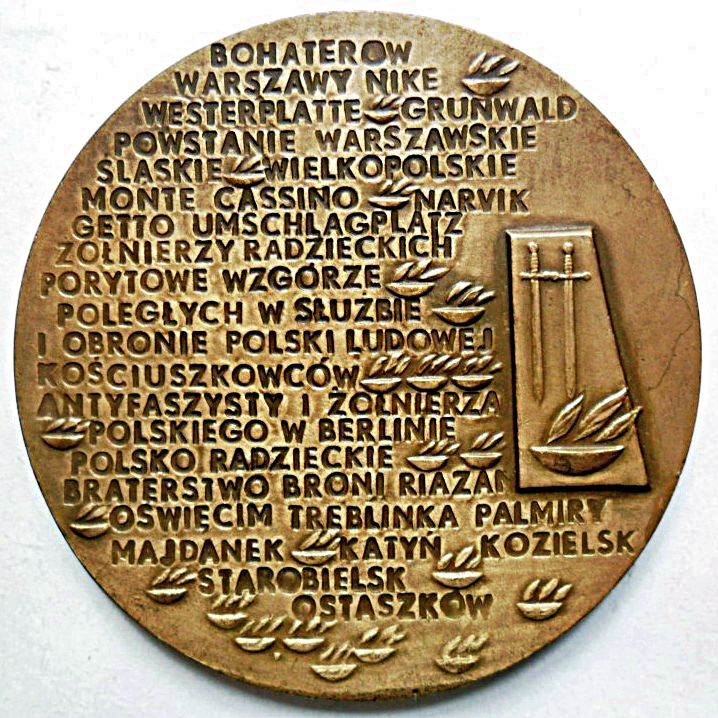 Medal pamiątkowy Rady Ochrony Pamięci Walk i Męczeństwa